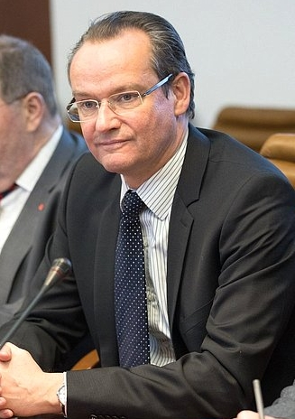 Гунтер Крихбаум — немецкий политик. Встреча в Совете Федерации России